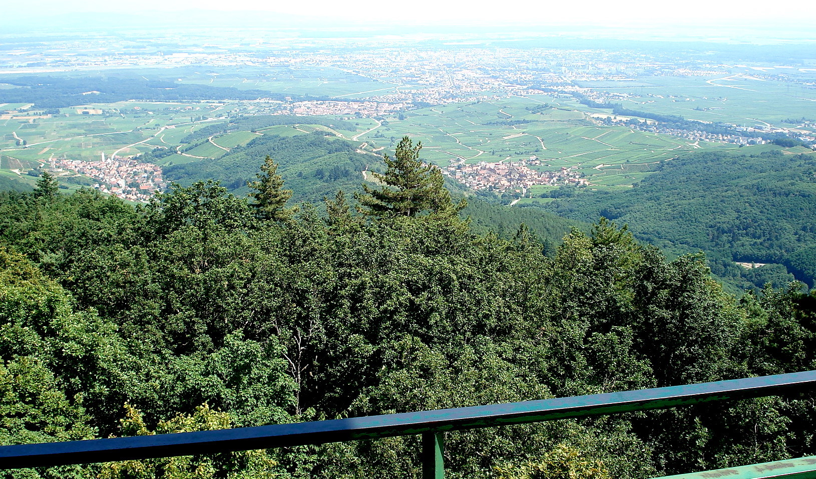 Vue prise depuis le sommet vosgien du Galtz (alt. 731m.), sur le versant oriental des Vosges. Coup d'oeil vers l'est-sud-est. Au nord (à gauche sur la photo), juste au-dessus des frondaisons proches, le village de Katzenthal (avec son clocher blanc et le château ruiné de Wineck un peu en contrehaut à gauche). Plus au sud (c.-à-d. à droite), à peu près à même distance de l'observateur, le village de Niedermorschwihr (église sombre, clocher ramassé). Les deux villages sont séparés par la colline appelée Winterberg. On aperçoit la RN 415 («Route du Vin») passant à quelques centaines de mètres en avant de Katzenthal. Au loin, la plaine d'Alsace, où s'étale l'agglomération colmarienne. La rambarde à l'avant-plan ceinture le socle de la statue du Christ érigée au sommet du Galtz.